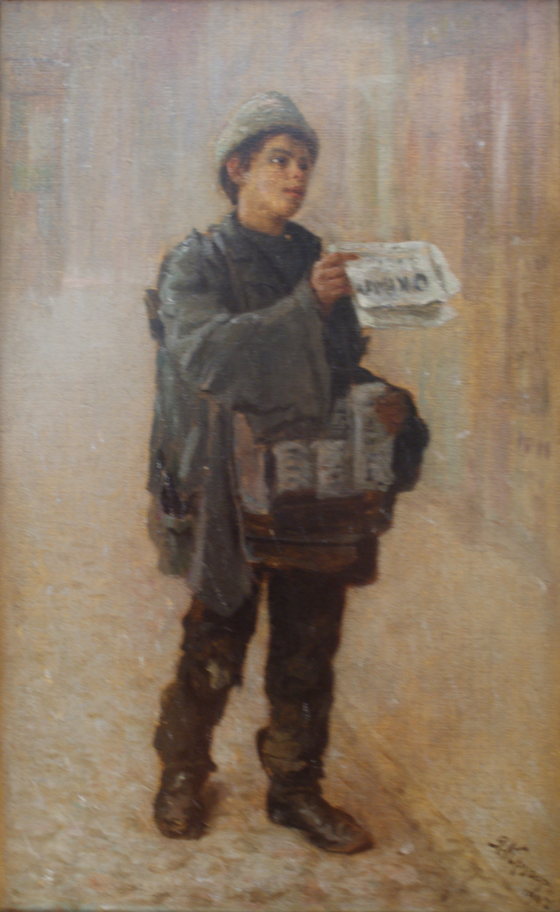 Газетчык. Палатно на кардоне, алей